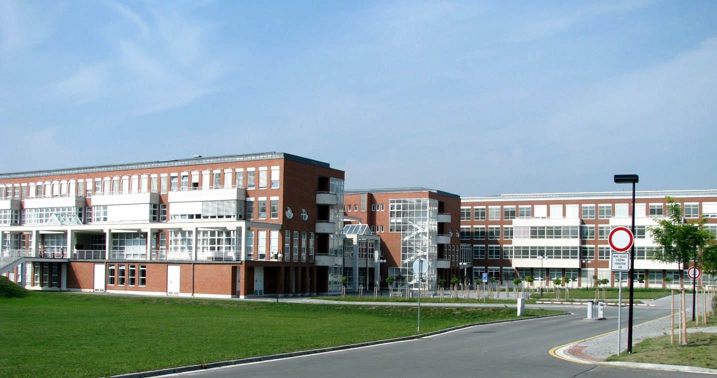 Hradec Králové, univerzitní areál Na Soutoku